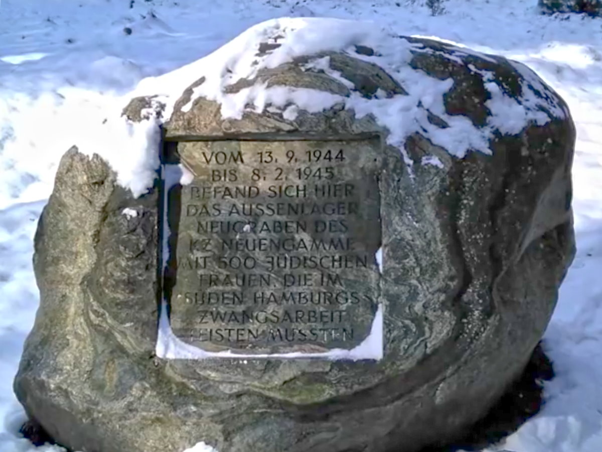 Gedenkstein des Frauenaußenlager Neuengamme in Neugraben 2018